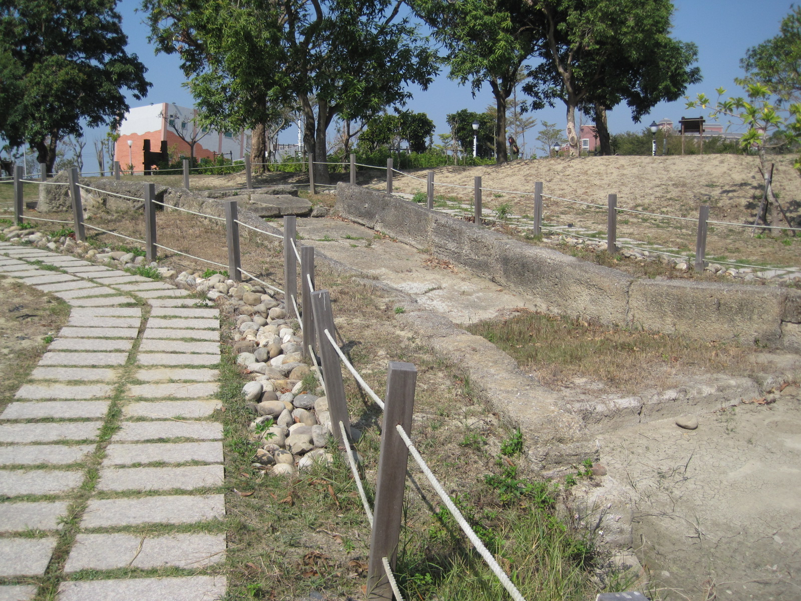 麻豆水堀頭古碼頭